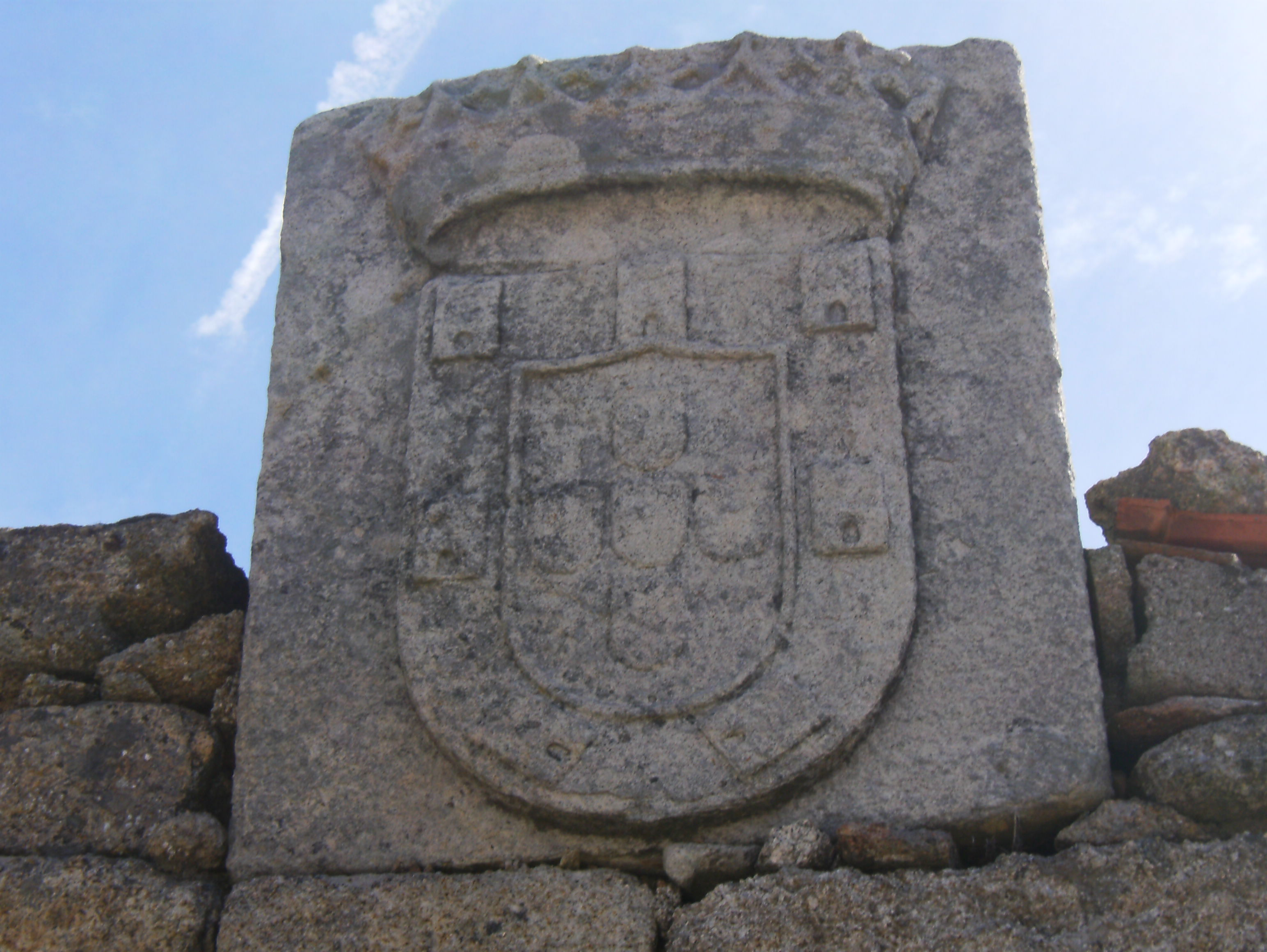 Brasão da vila de Castelo Bom, junto à Porta da Vila